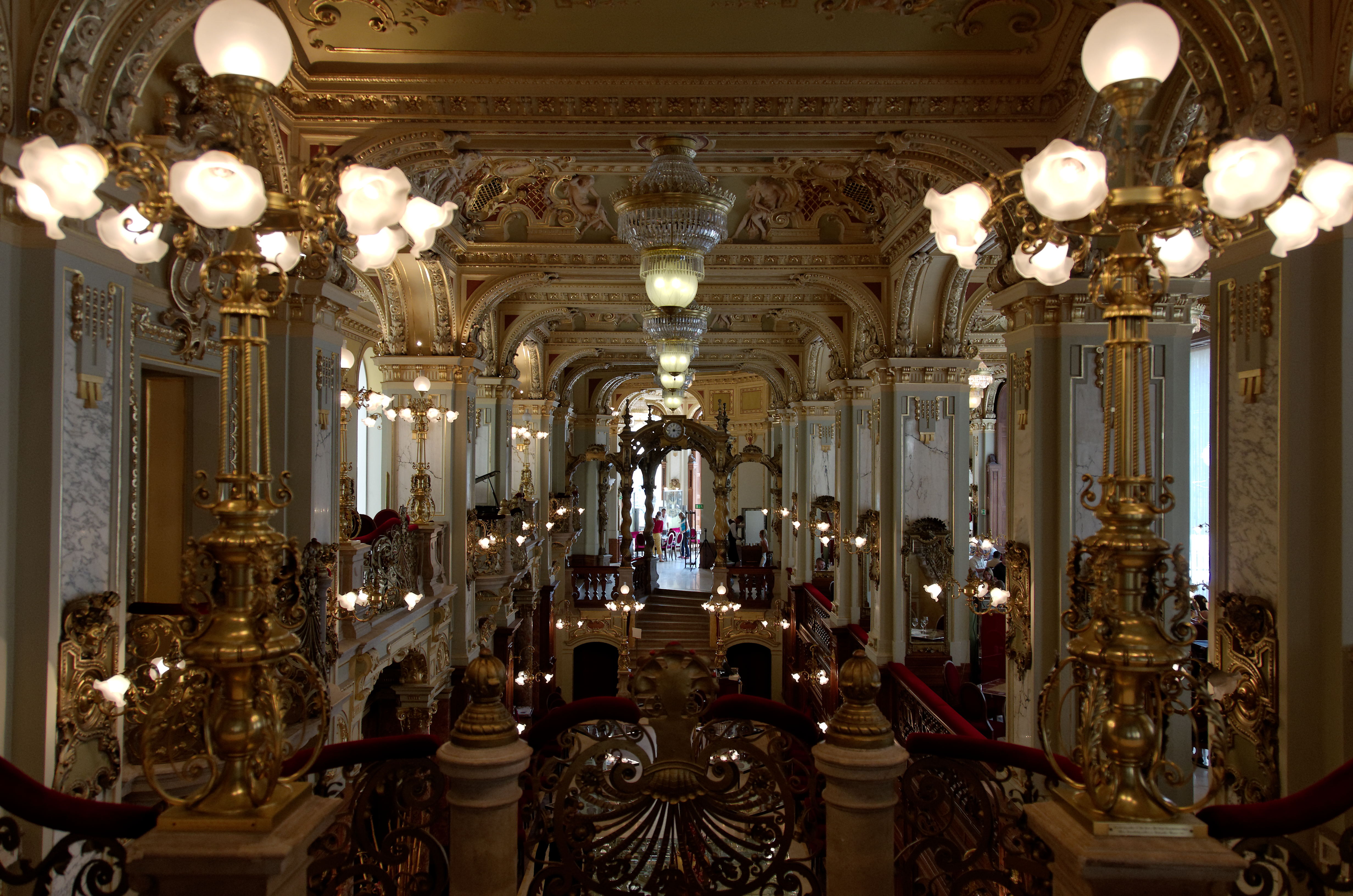 Café de New York, Budapest.